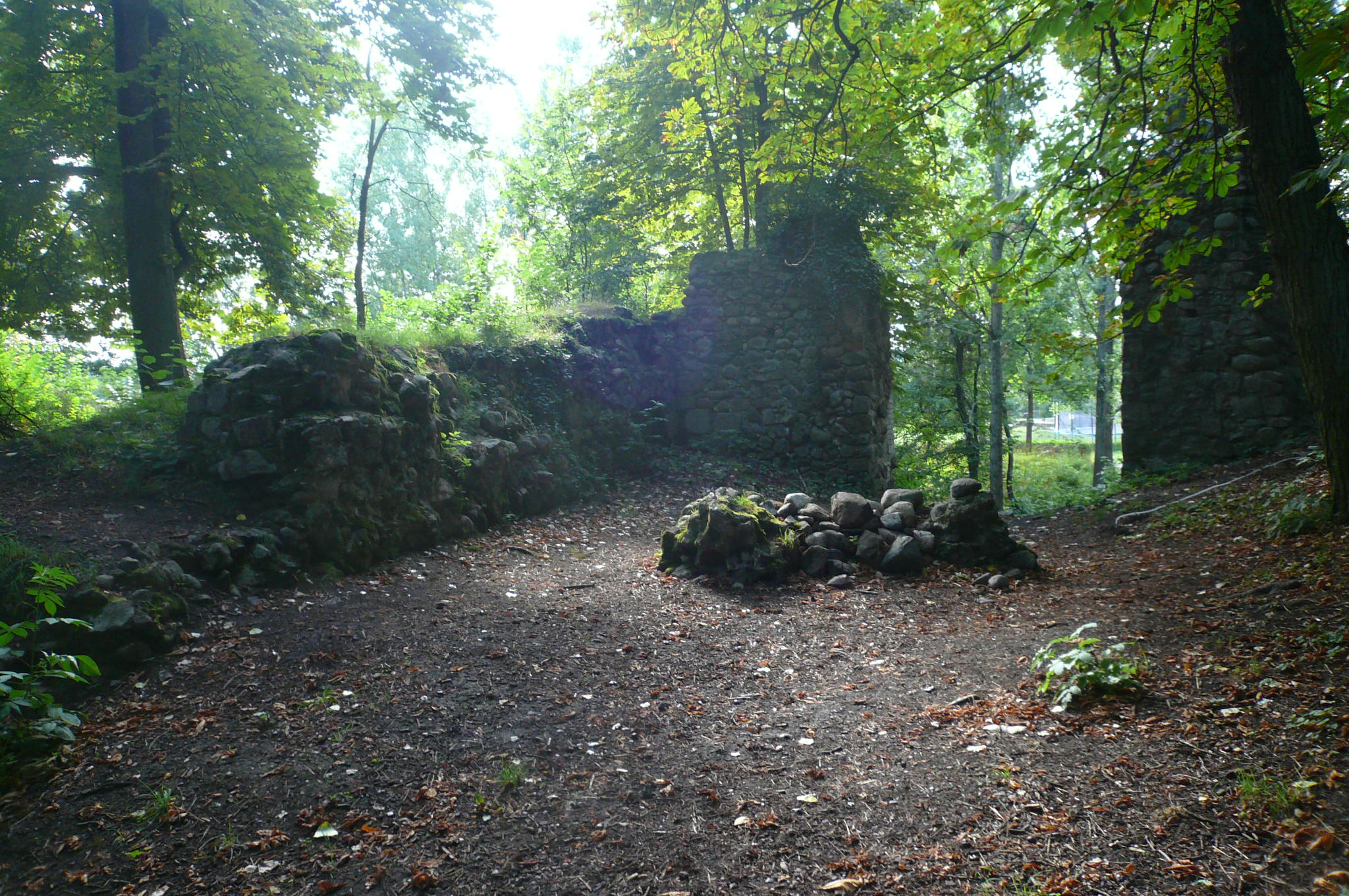 Ruiny zamku w Moryniu